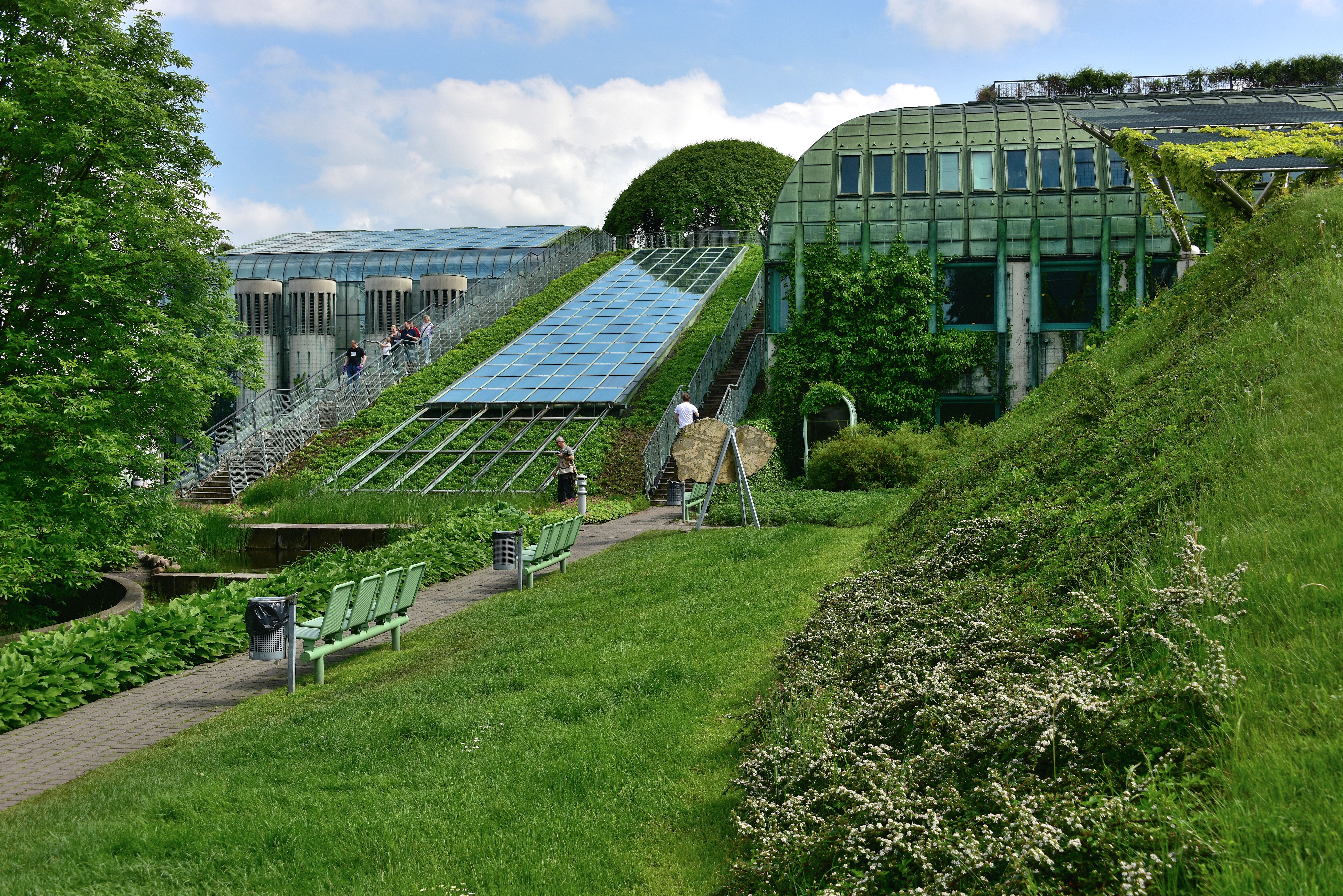 Ogród Biblioteki Uniwersyteckiej w Warszawie